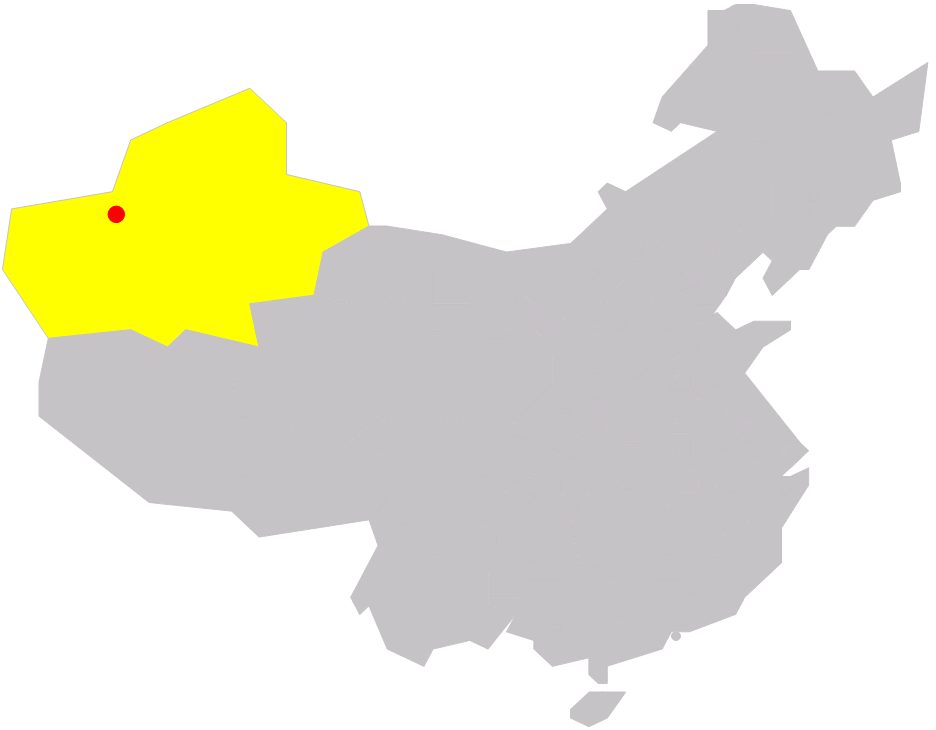 position of Aksu in China Aksu Aksu Aksu